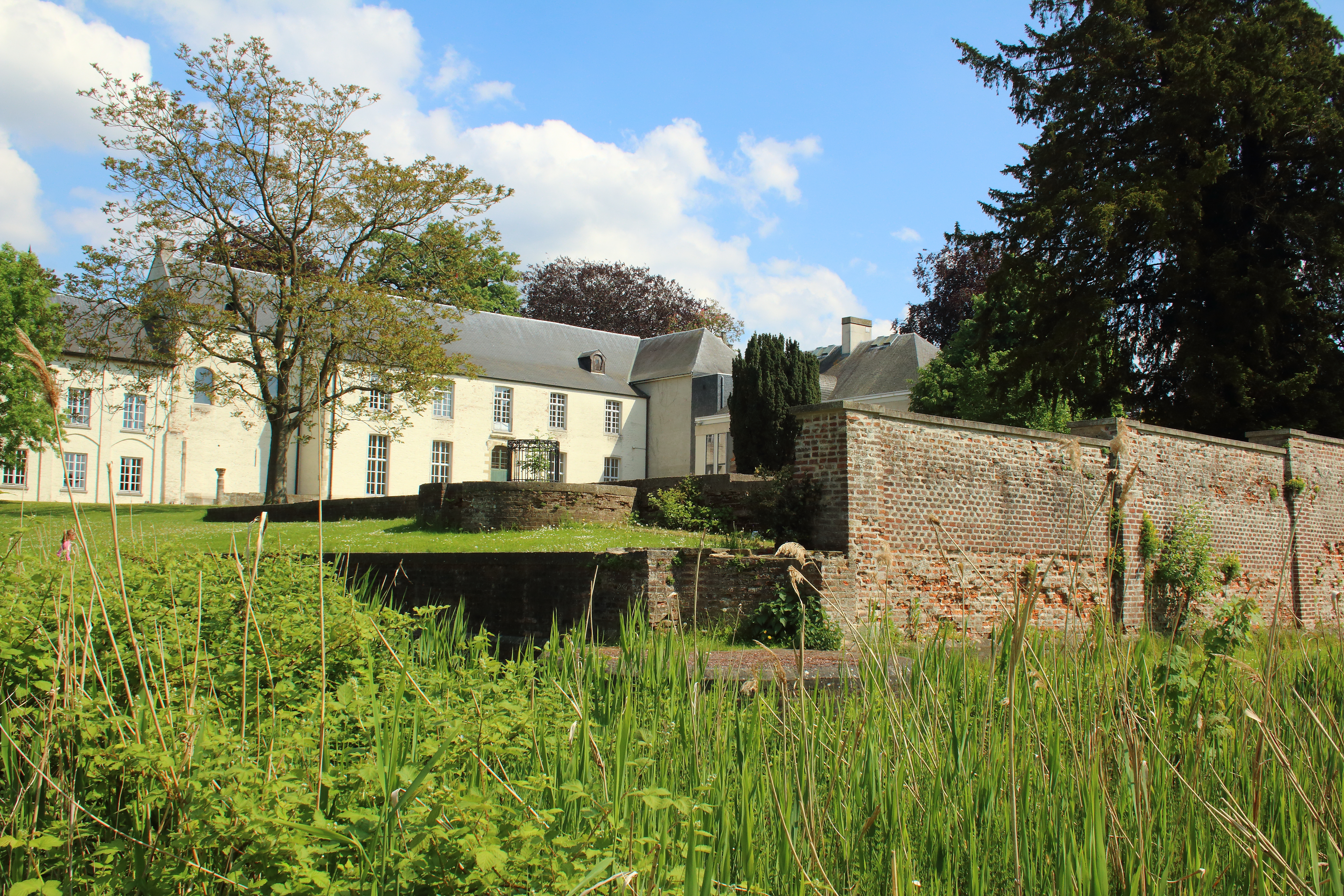 Egmontkasteel/ Kasteel van Egmont, Zottegem, Vlaanderen, België